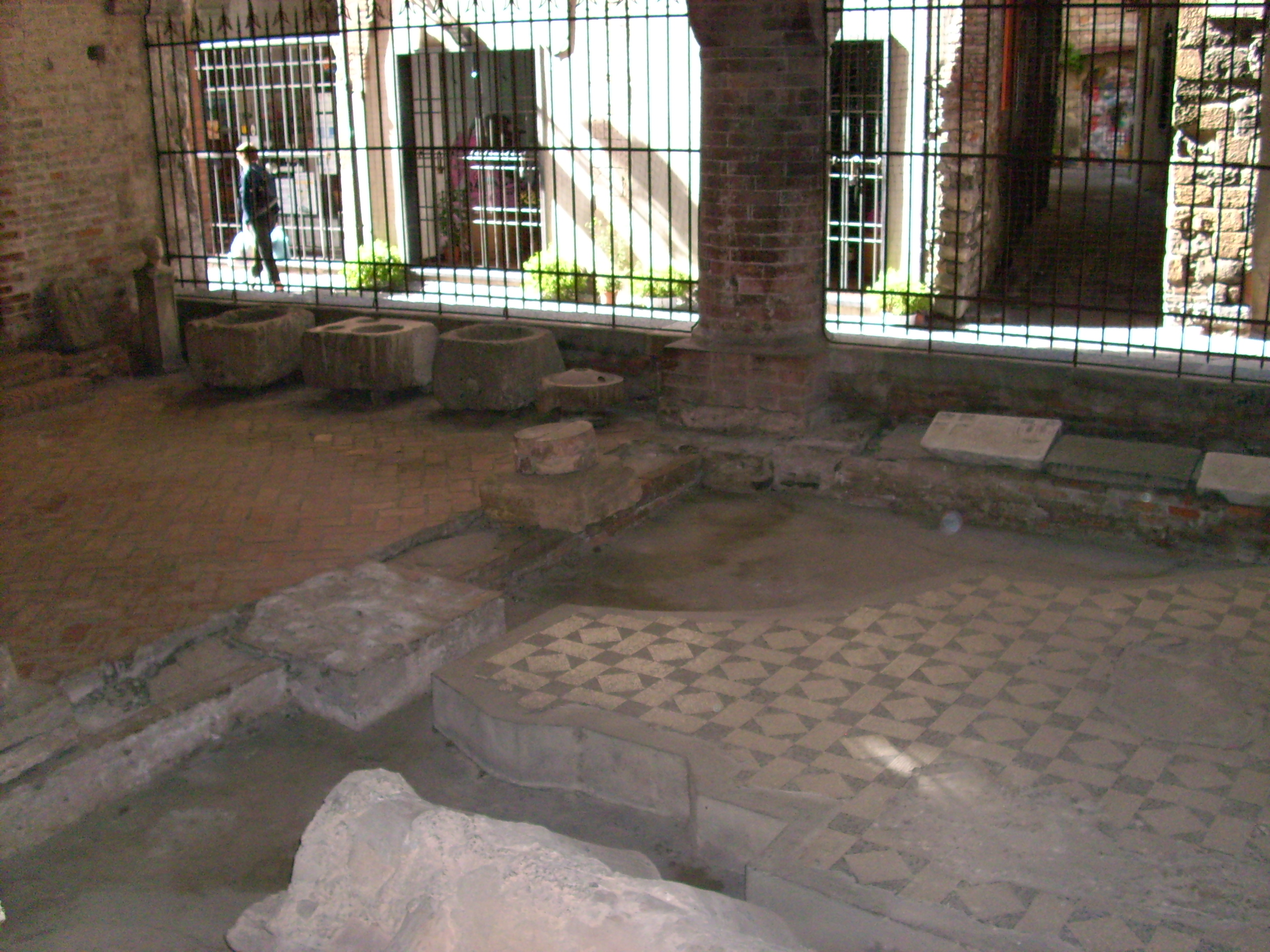 Centro storico di Albenga, Liguria, Italia